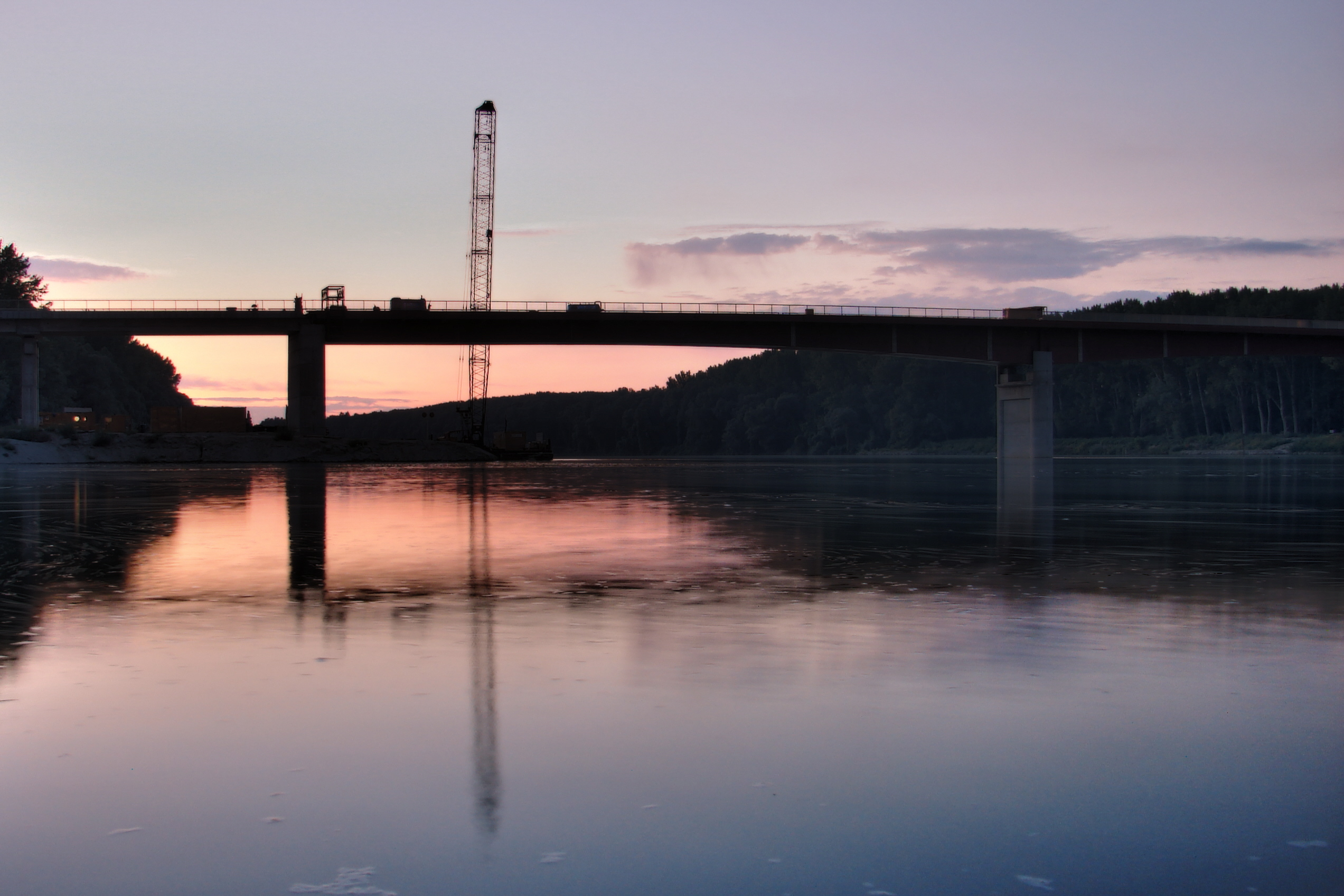 Nový osijecký most západního silničního okruhu přes řeku Drávu, Chorvatsko